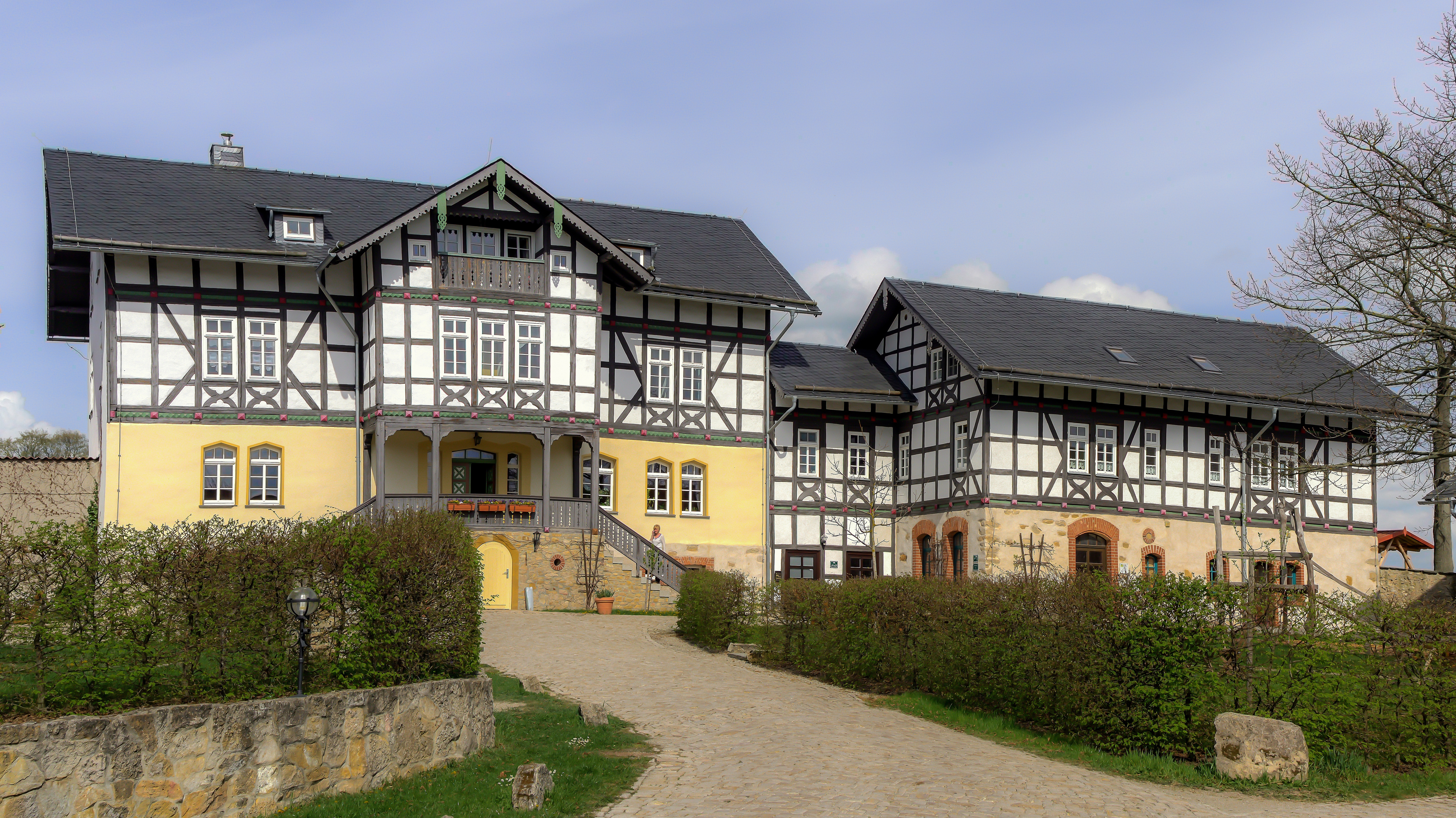 Domäne Groschwitz,Germany